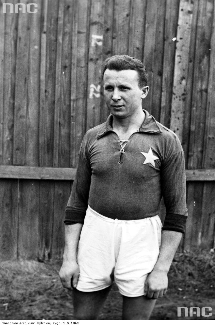 Antoni Łyko w barwach Wisły Kraków